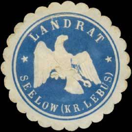 Sealing stamp Title: Landrat Seelow Kreis Lebus Description: blau, weiß, geprägt Place: Seelow size: 4 cm